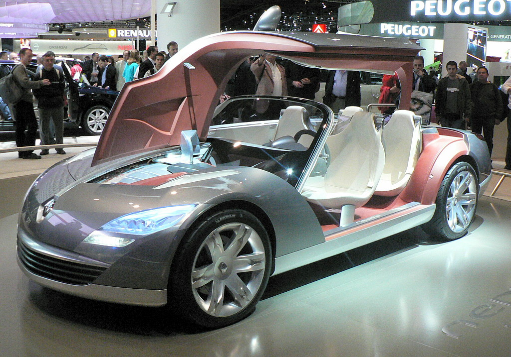 Mondial de l'automobile, Paris 2006